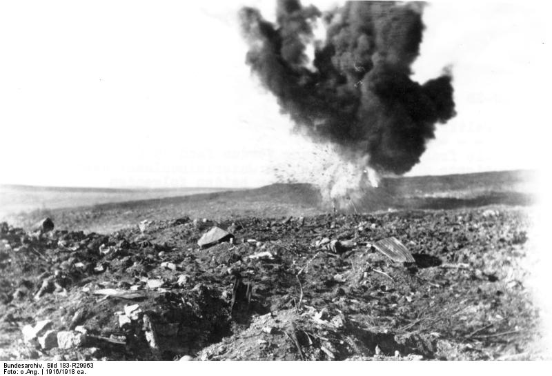 ADN-ZB-Archiv I. Weltkrieg 1914-18 Um die französische Festung Verdun fand 1916 die blutigste und verlustreichste Materialschlacht des Weltkrieges statt. Auch in den beiden folgenden Jahren wurde in diesem Gebiet ständig gekämpft. UBz.: Sperrfeuer bei Verdun. 6500-28 [Scherl Bilderdienst]